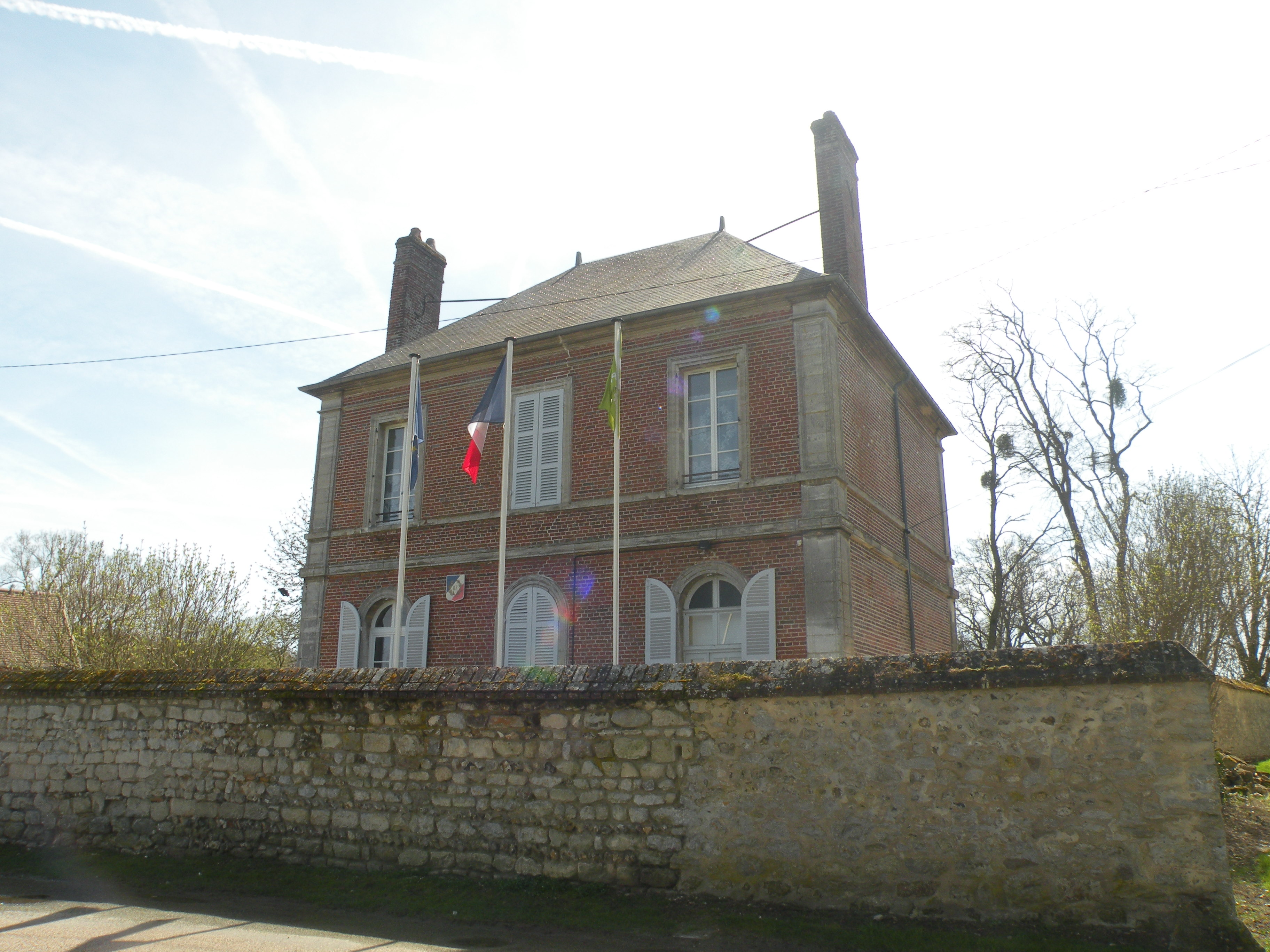 Fay-les-Étangs mairie